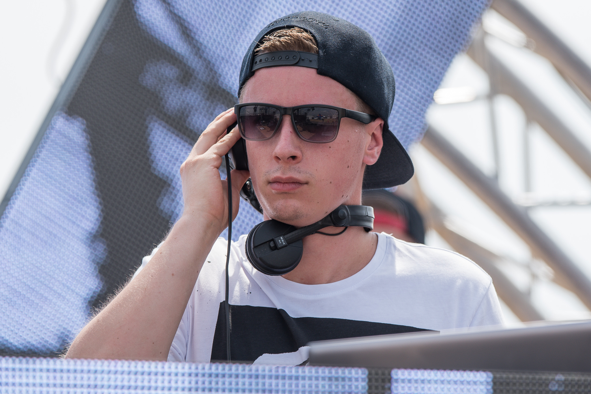 3rd Stage,Festival,Konzert,Livekonzert,Livemusik,Musik,Open Beatz 2016,Shippo